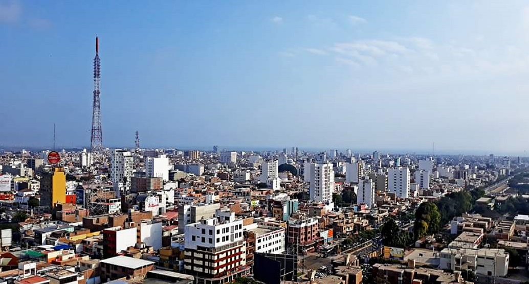 Panoramica de la zona de San Andrés